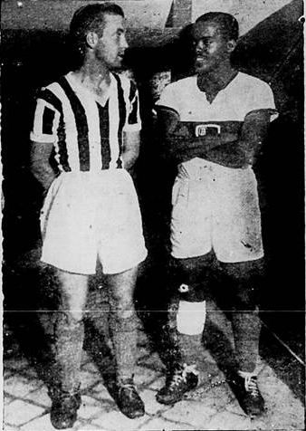 El jugador de Rosario Central Harry Hayes (hijo), en esta ocasión representando a la Selección de Rosario, junto al futbolista brasileño de Flamengo Leónidas Da Silva en ocasión de celebrarse un cotejo amistoso.